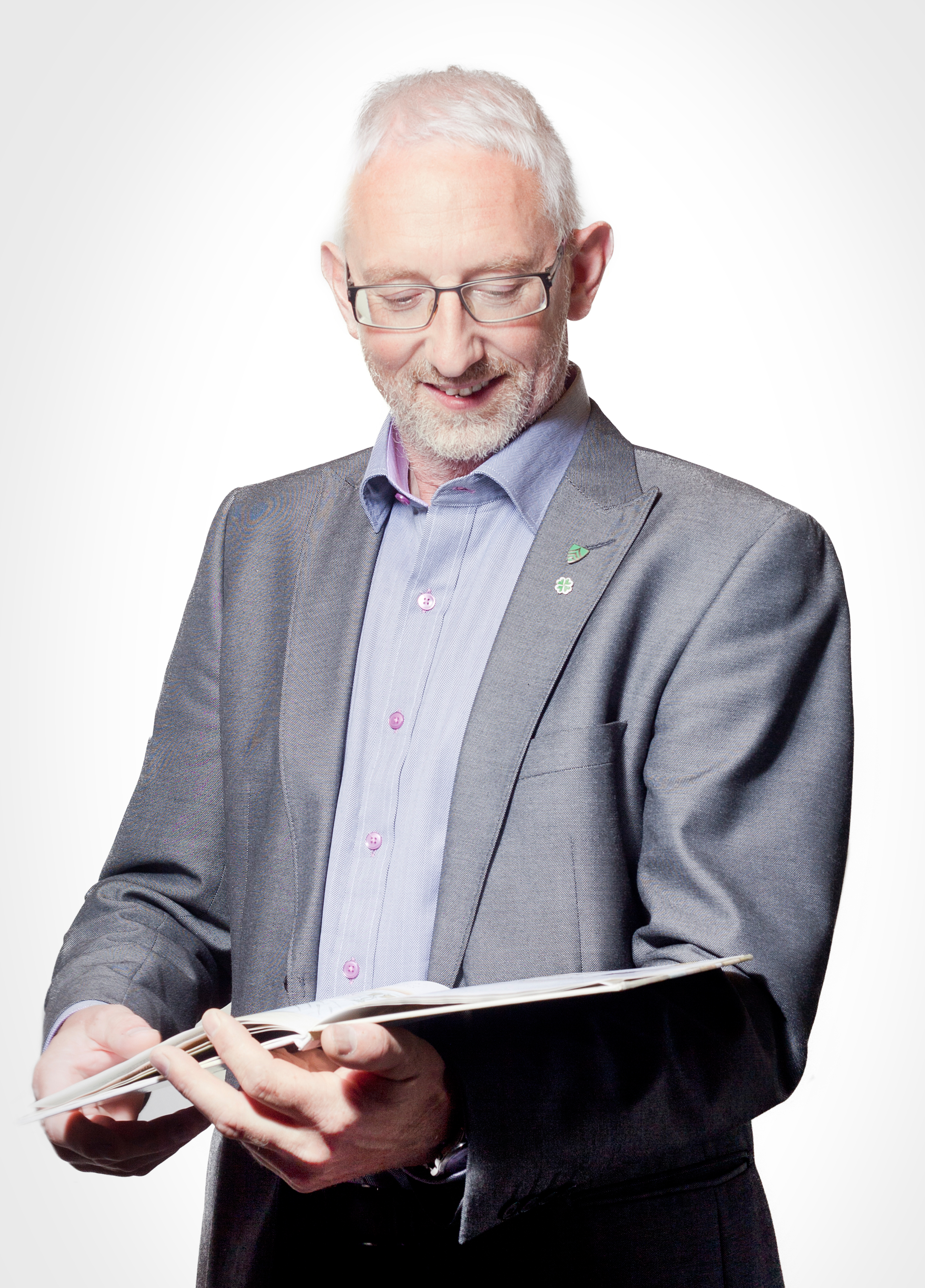 Ordfører Olav Jørgen Bjørkås fra Flatanger, Nord-Trøndelag. Bildet er tatt i forbindelse med Nord-Trøndelag fylkesbiblioteks kampanje "Leseambassadører"